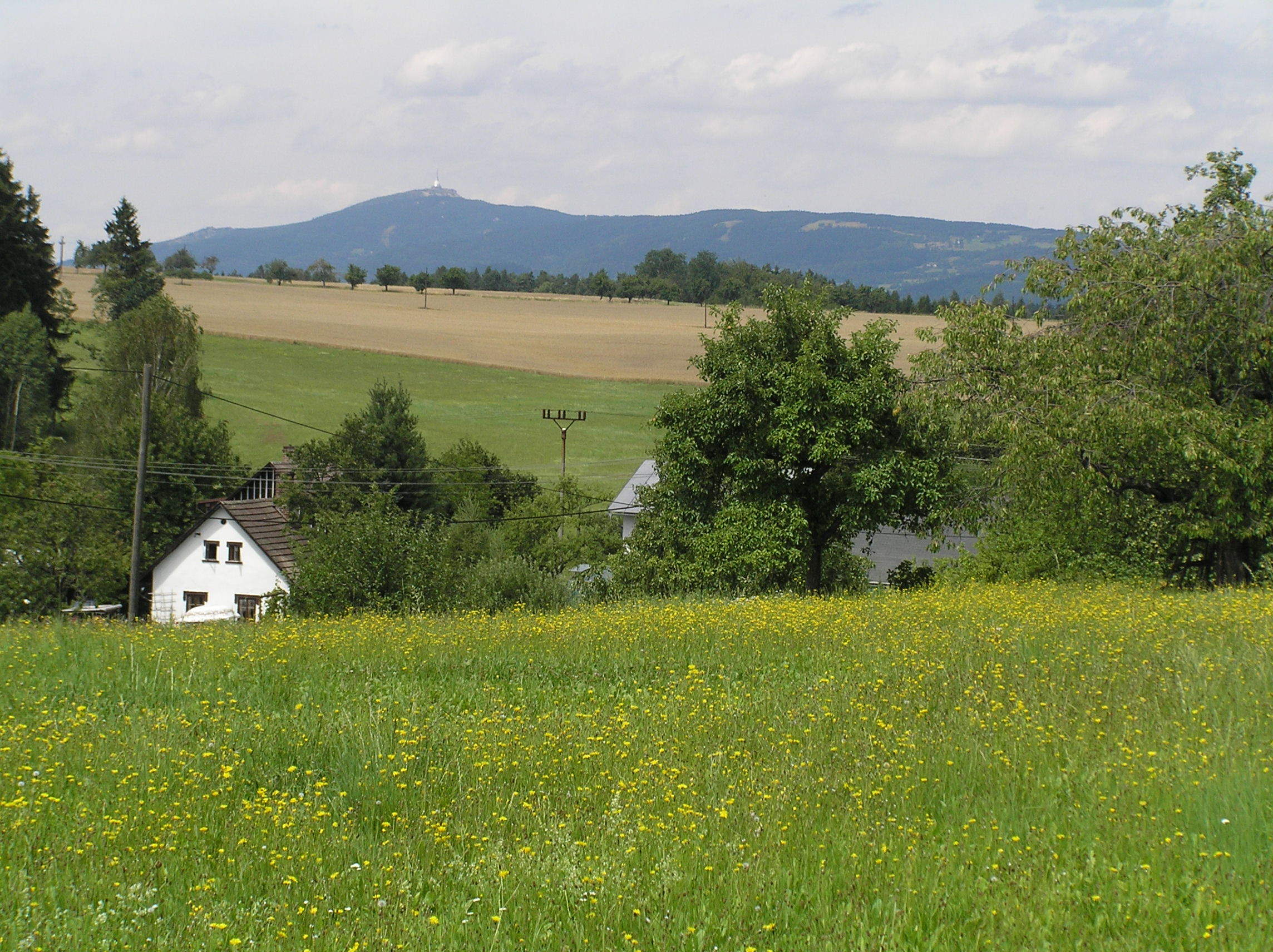 Červenice (u Pěnčína, v Podještědí) - celkový pohled do okolí chalupy če. 3, v pozadí Ještěd